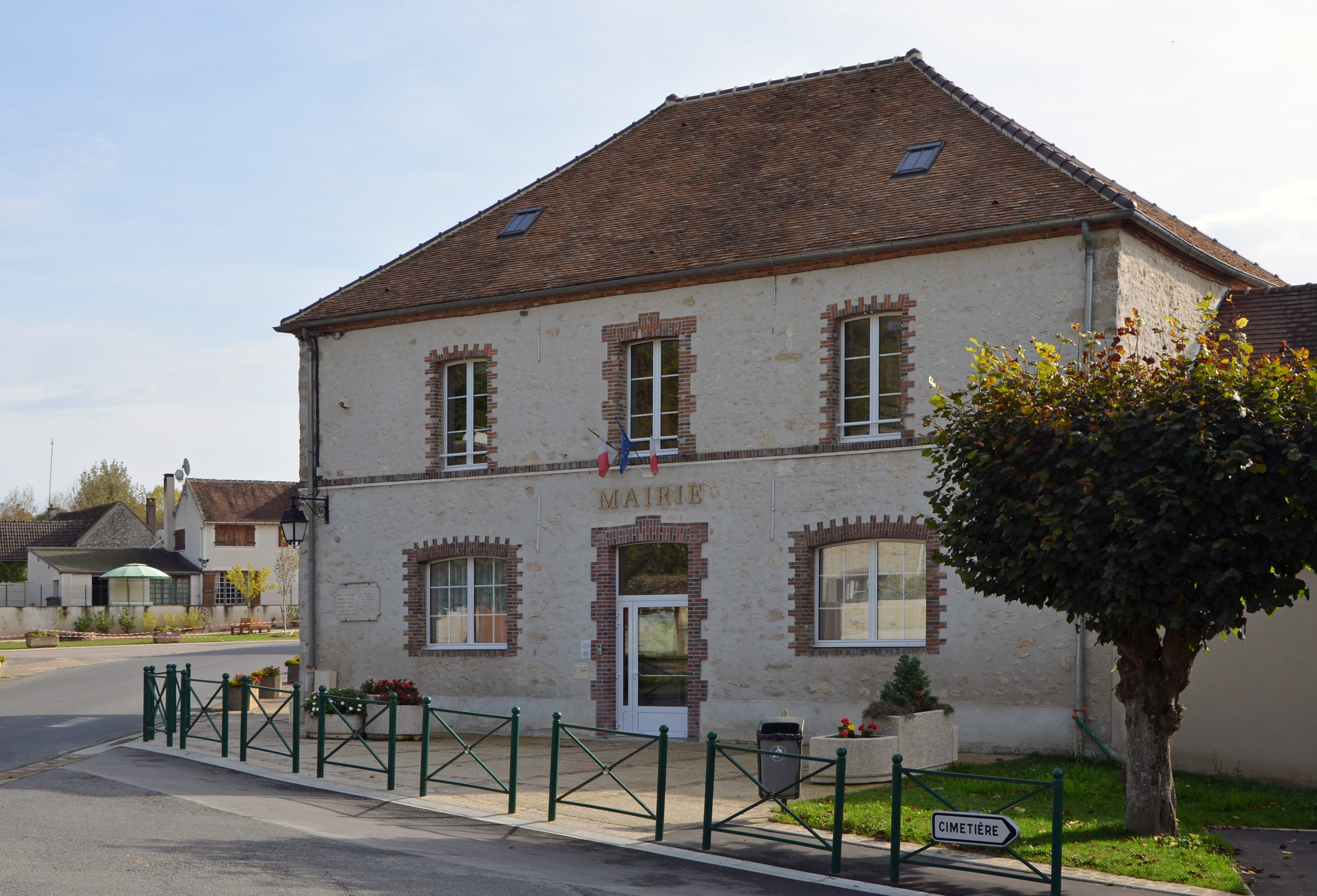 Mairie de Chalautre-la-Petite, Seine-et-Marne, Ile de France, France